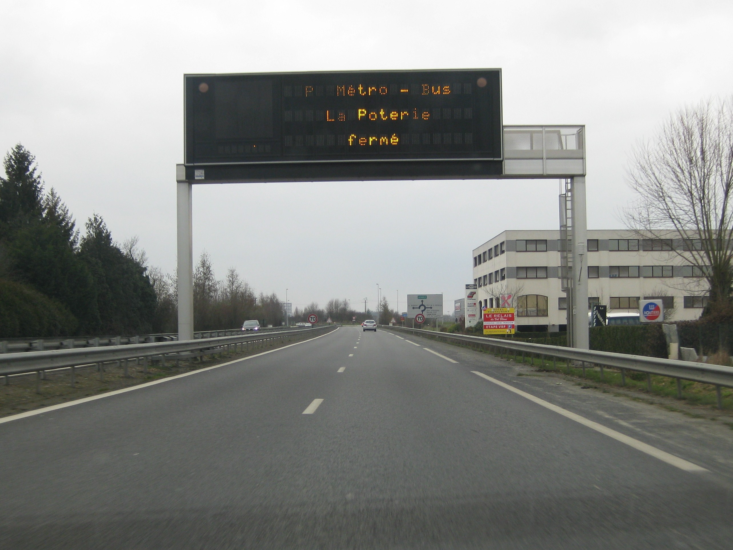 Panneau à messages variables sur la RD163.